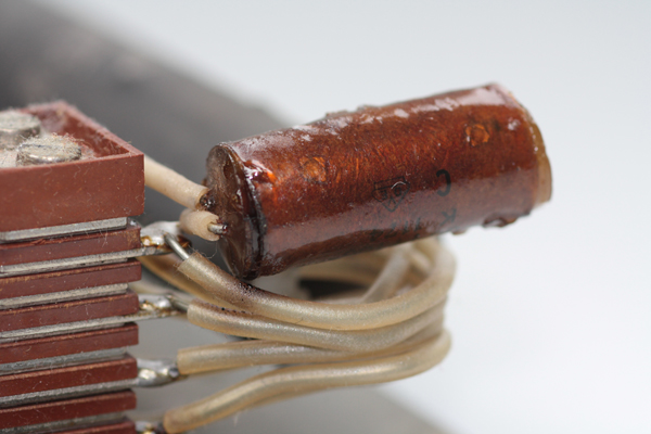 defekter Kondensator in einem Fußpedal für Nähmaschinen